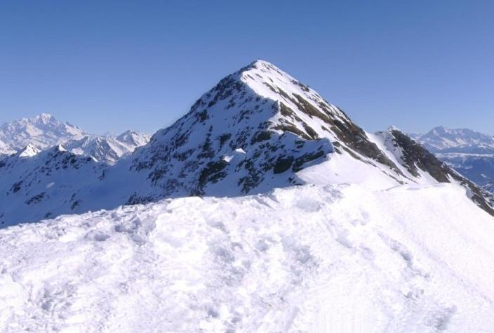 Le Grand Arc pris depuis le Petit Arc. Au fond à gauche, le Mont Blanc. / Grand Arc taken from Petit Arc's summit. On left backgroung, Mont Blanc.